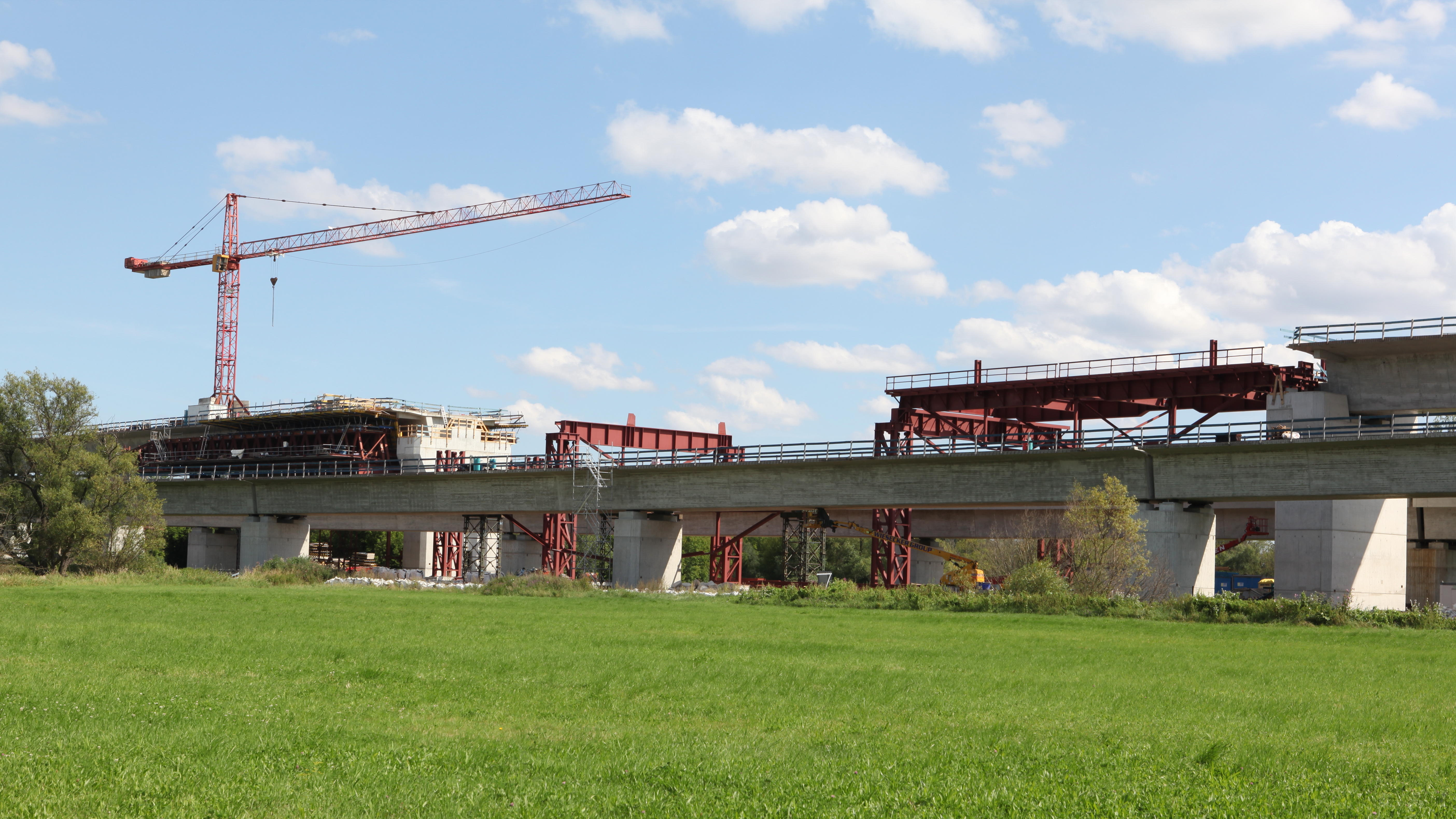 Saale-Elster-Talbrücke bei Halle in Sachsen-Anhalt